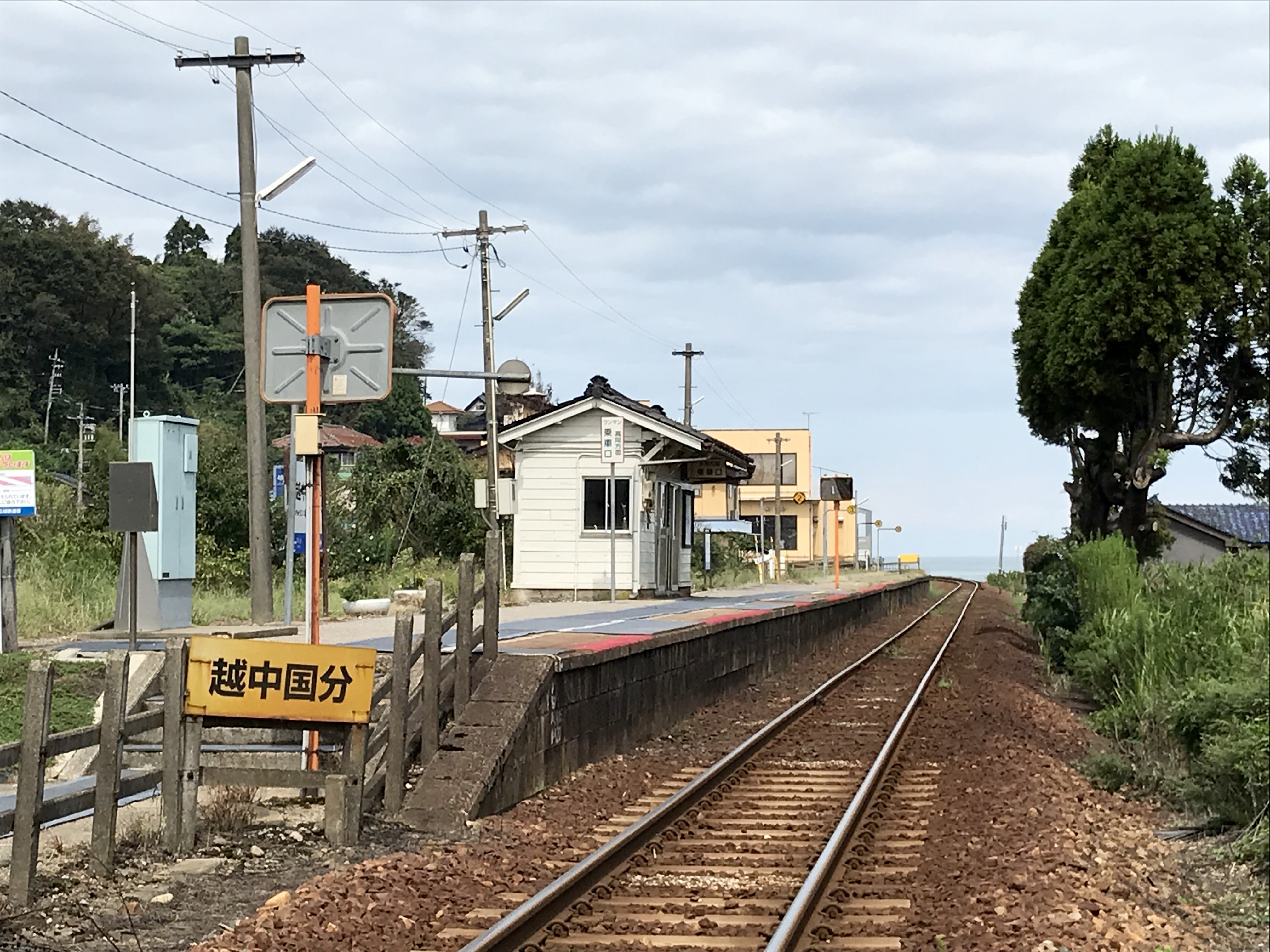 JR西日本氷見線越中国分駅